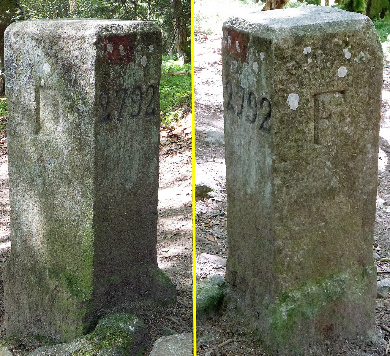 Grenzstein mit der Nummer 2792 und den Buchstaben "D" und "F" zur Kennzeichnung der ehemaligen Grenze zwischen Deutschland und Frankreich auf dem Vogesenkamm.